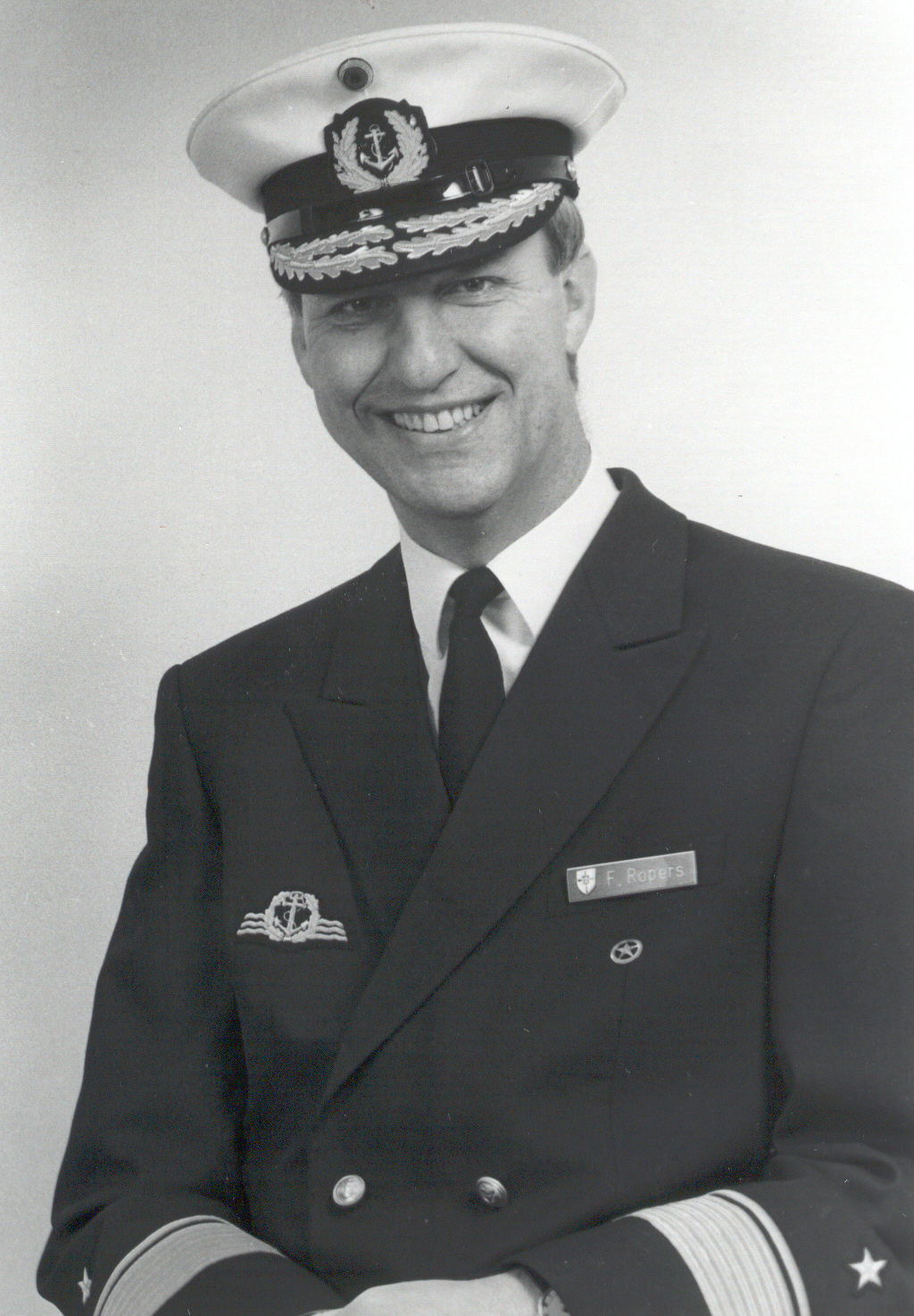 Porträtfotografie von Flottillenadmiral Frank Ropers